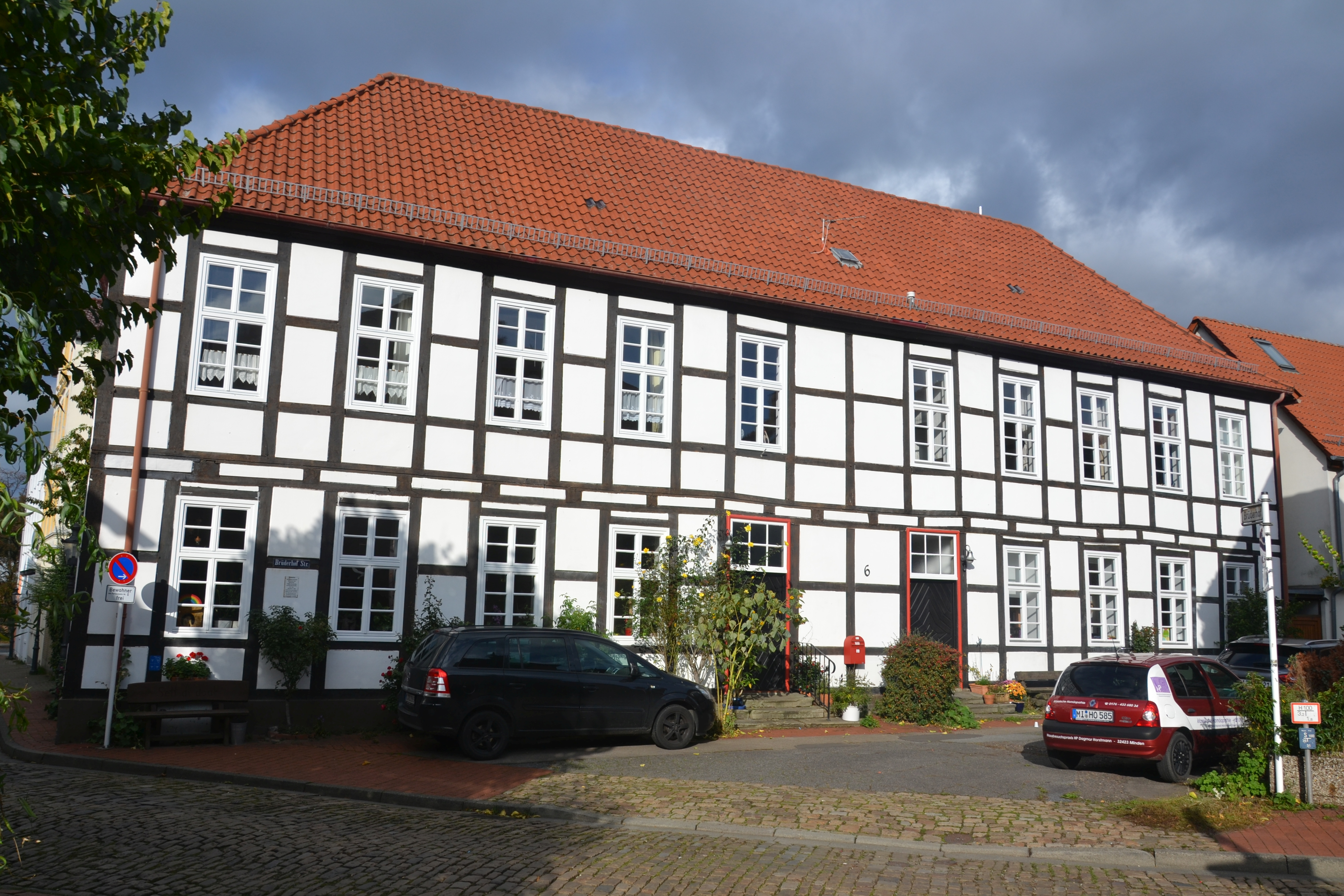 Der denkmalgeschützte Haus Brüderhof 6 in der oberen Altstadt von Minden.